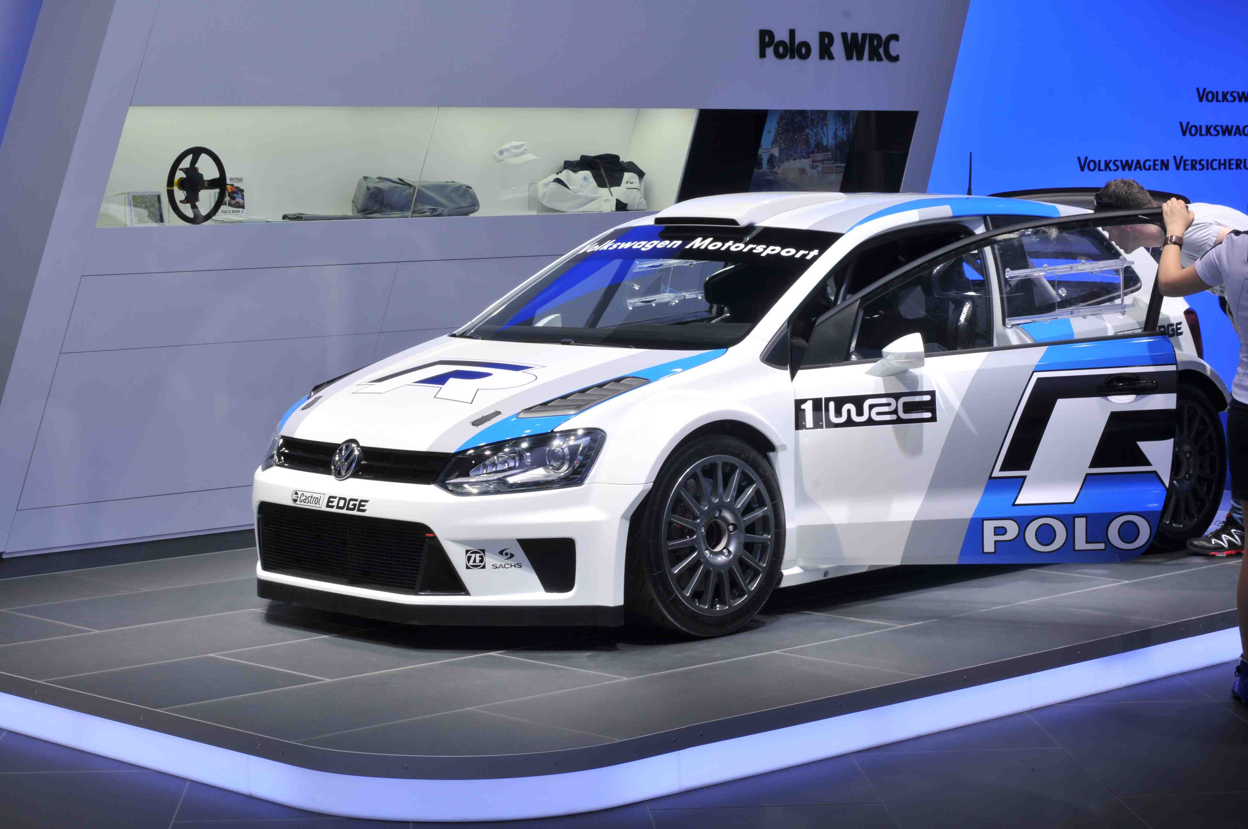 IAA 2011 - Internationale Automobilausstellung in Frankfurt/Main